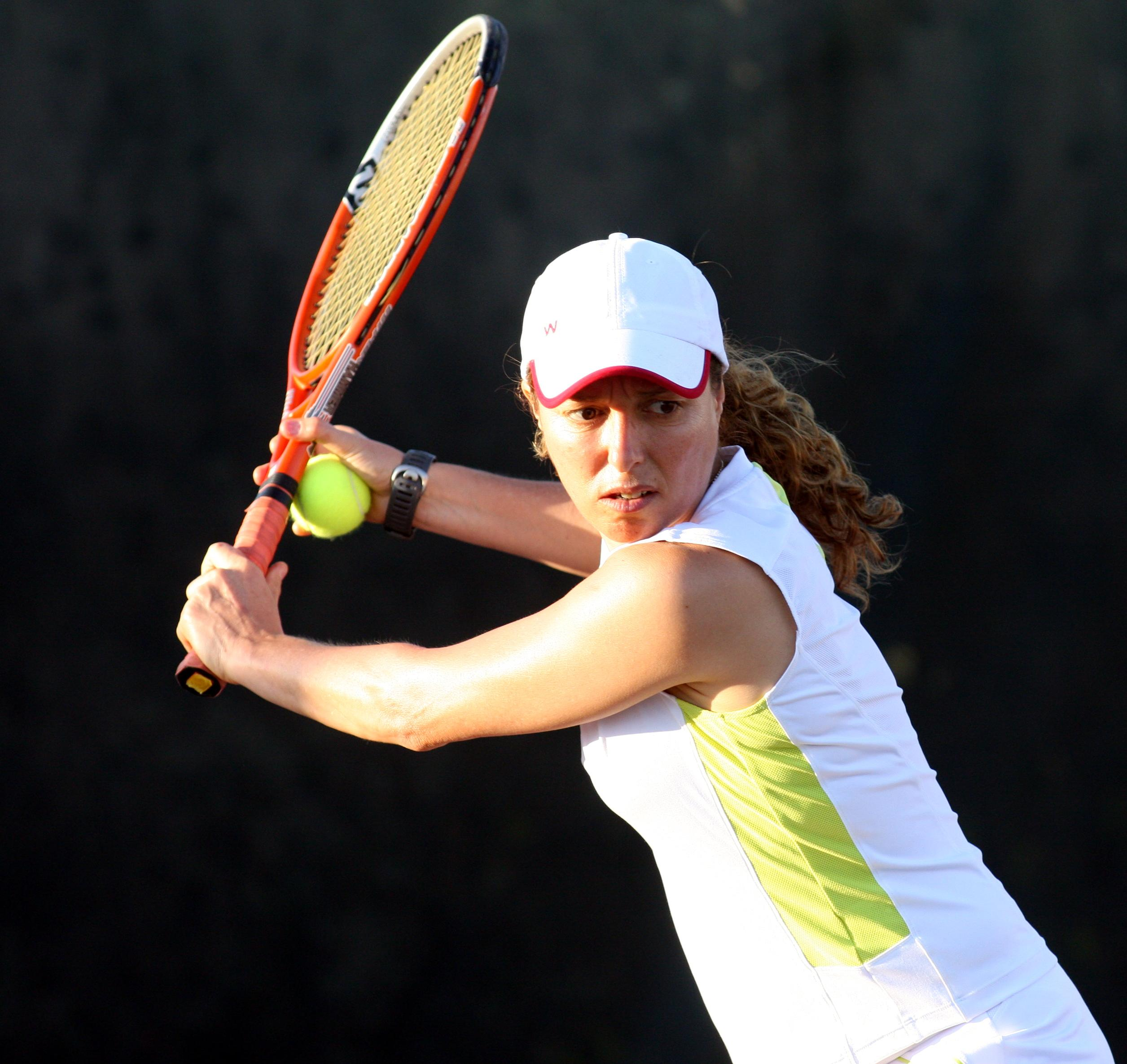 רקפת בנימיני